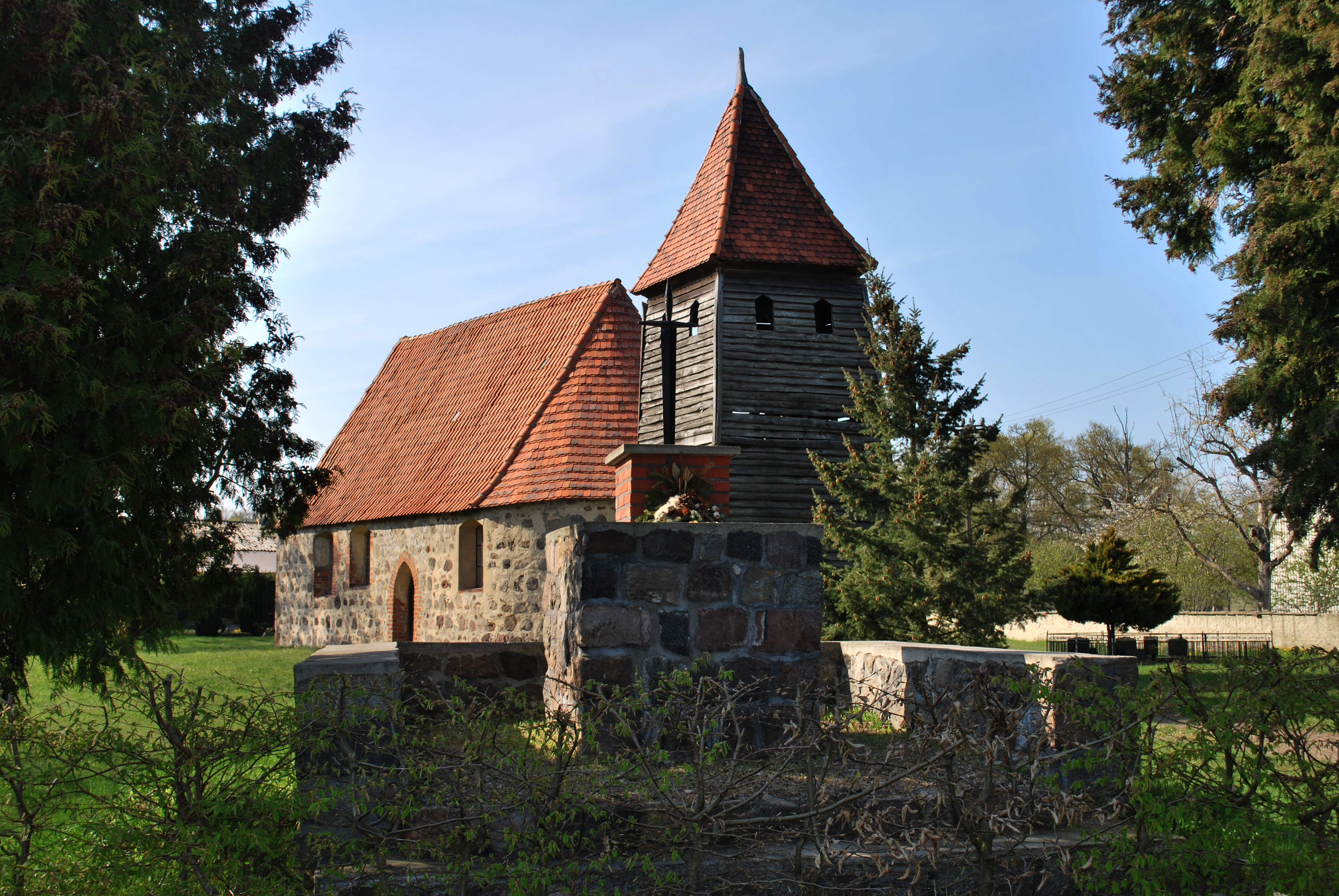 Dorfkirche in Hagen (Flecken Apenburg-Winderfeld)